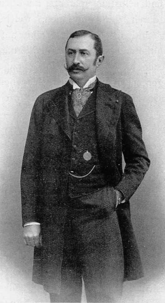 Déchy Mór